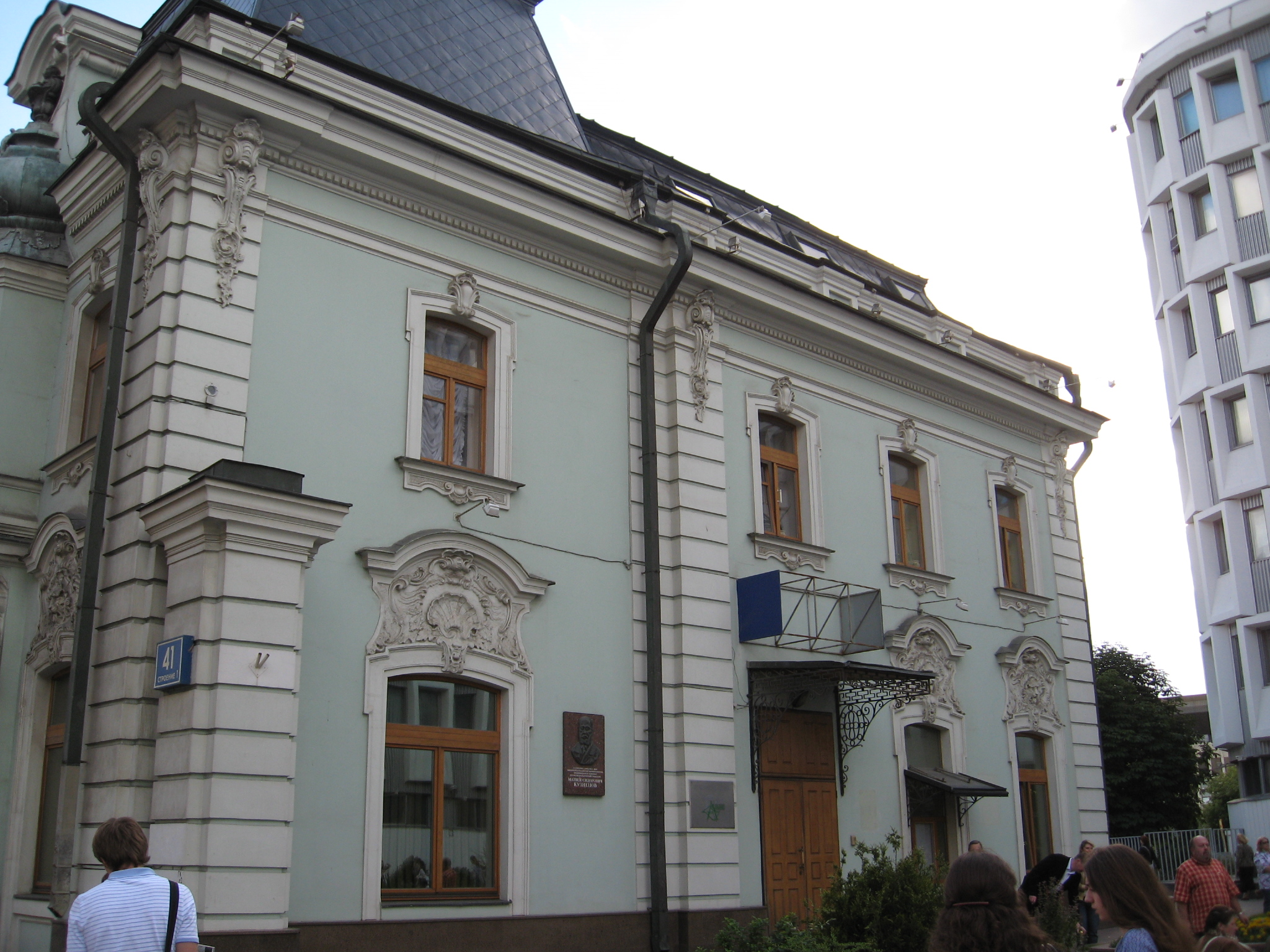 Голубой домик 1